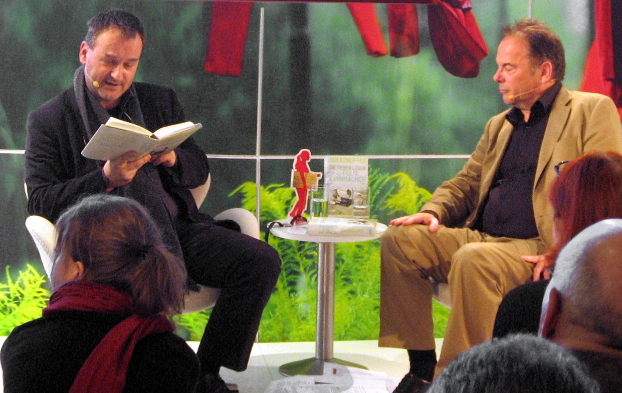 Klaus Hensel hört Jan Koneffke bei einer Lesung am Arte-Stand auf der Frankfurter Buchmesse 2011 zu.